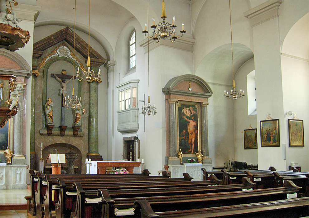 Innenansicht der Atzgersdorfer Pfarrkirche, Wien